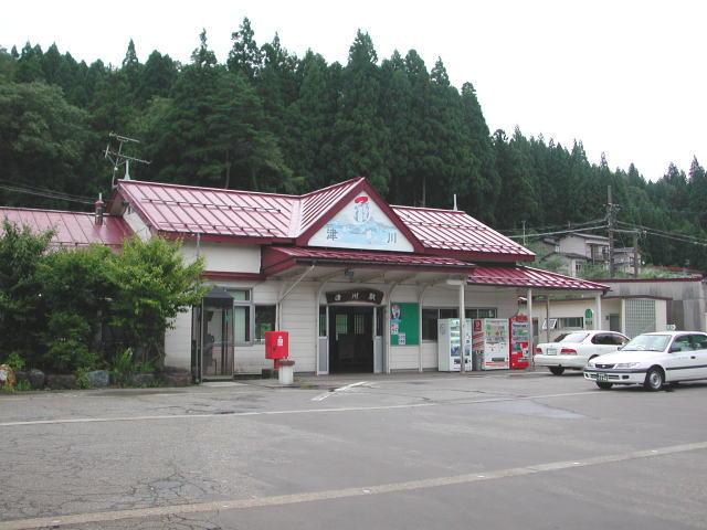 JR津川駅